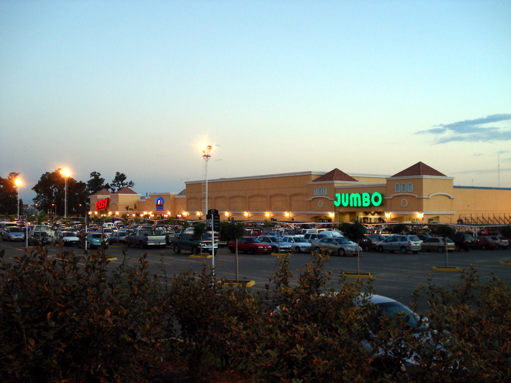 Vista exterior del Portal Tucumán Shopping, Tucumán, Argentina.